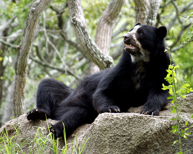 El oso frontino, llamado también de anteojos, es un animal típico de la fauna andina. Se encuentra áreas de montaña de Colombia, Ecuador, Perú y Bolivia, por supuesto que también contamos con su presencia en Venezuela. Actualmente su imagen se ve en el billete de 50 bolívares del país y se busca su protección para evitar su extinción. Éste modelo para mi en El Parque Zoológico y Botánico Bararida Barquisimeto, Estado Lara.